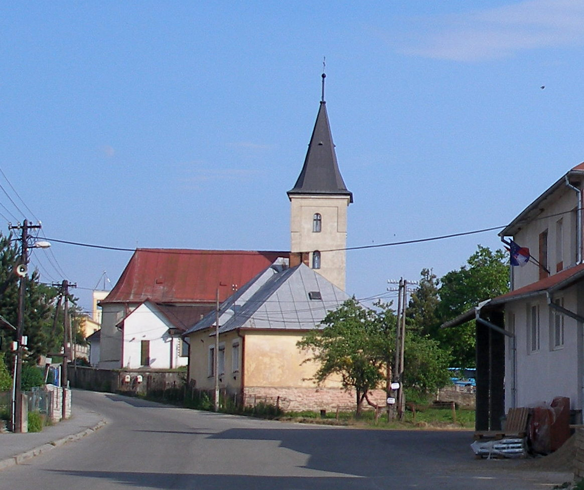 Obec Medzany, rímskokatolícky kostol